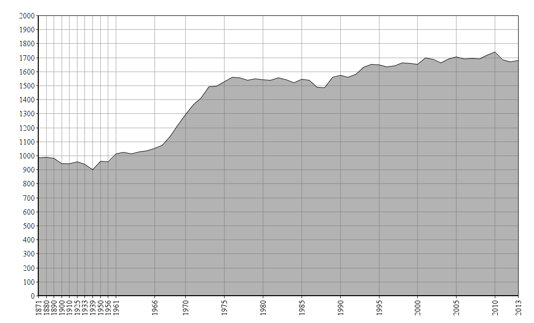 Dieses Bild zeigt die Bevölkerungsstatistik von Fischerbach